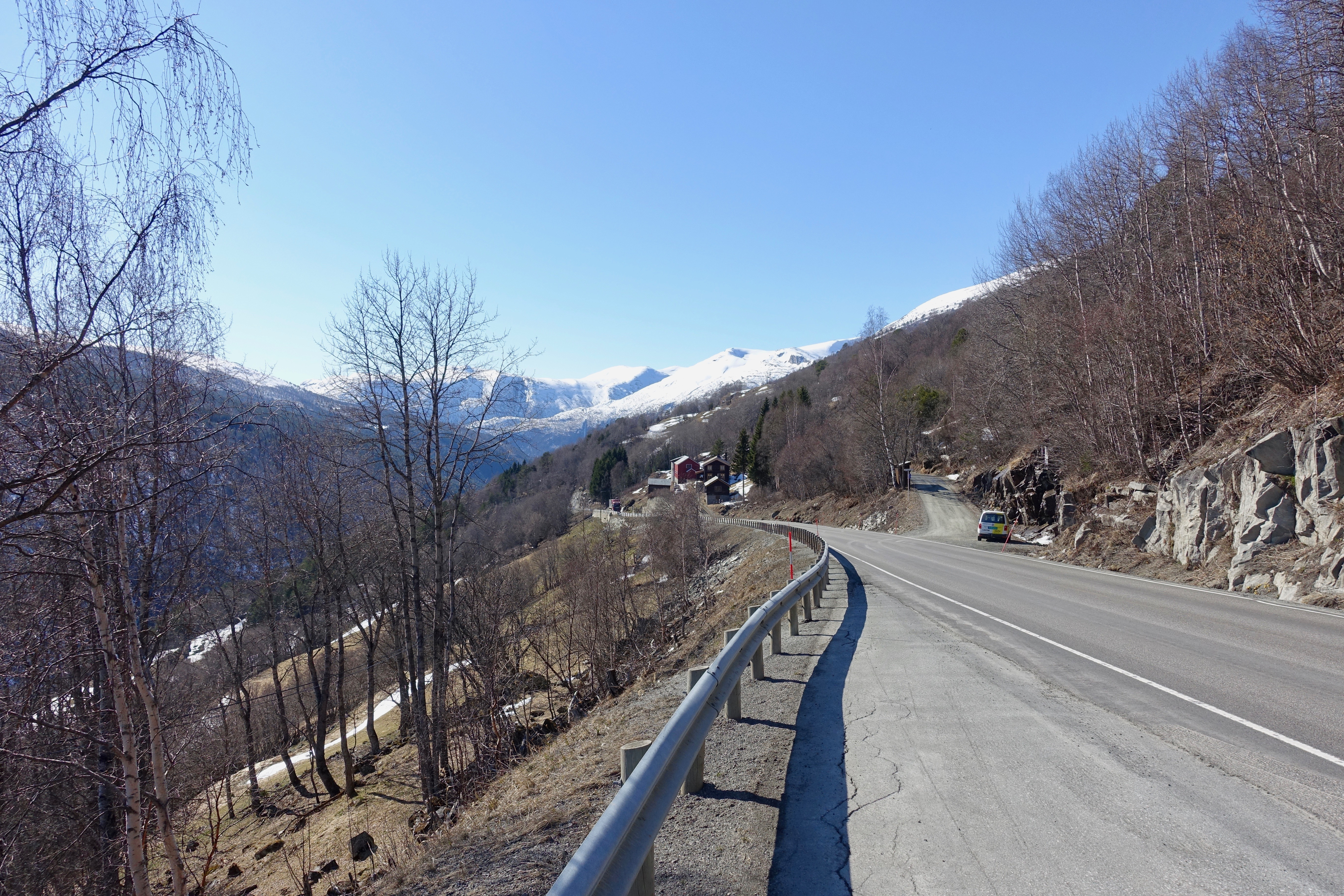 Riksvei 70 (Sunndalsvegen) i den bratte,nordre dalsida ned mot elva Driva, like vest for Lønset i Oppdal i Trøndelag fylke. Avkjøring til Klevgardsvegen. Utsikt vestover. Dalen fortsetter i Sunndalen i Møre og Romsdal fylke. Foto 2019-04-11